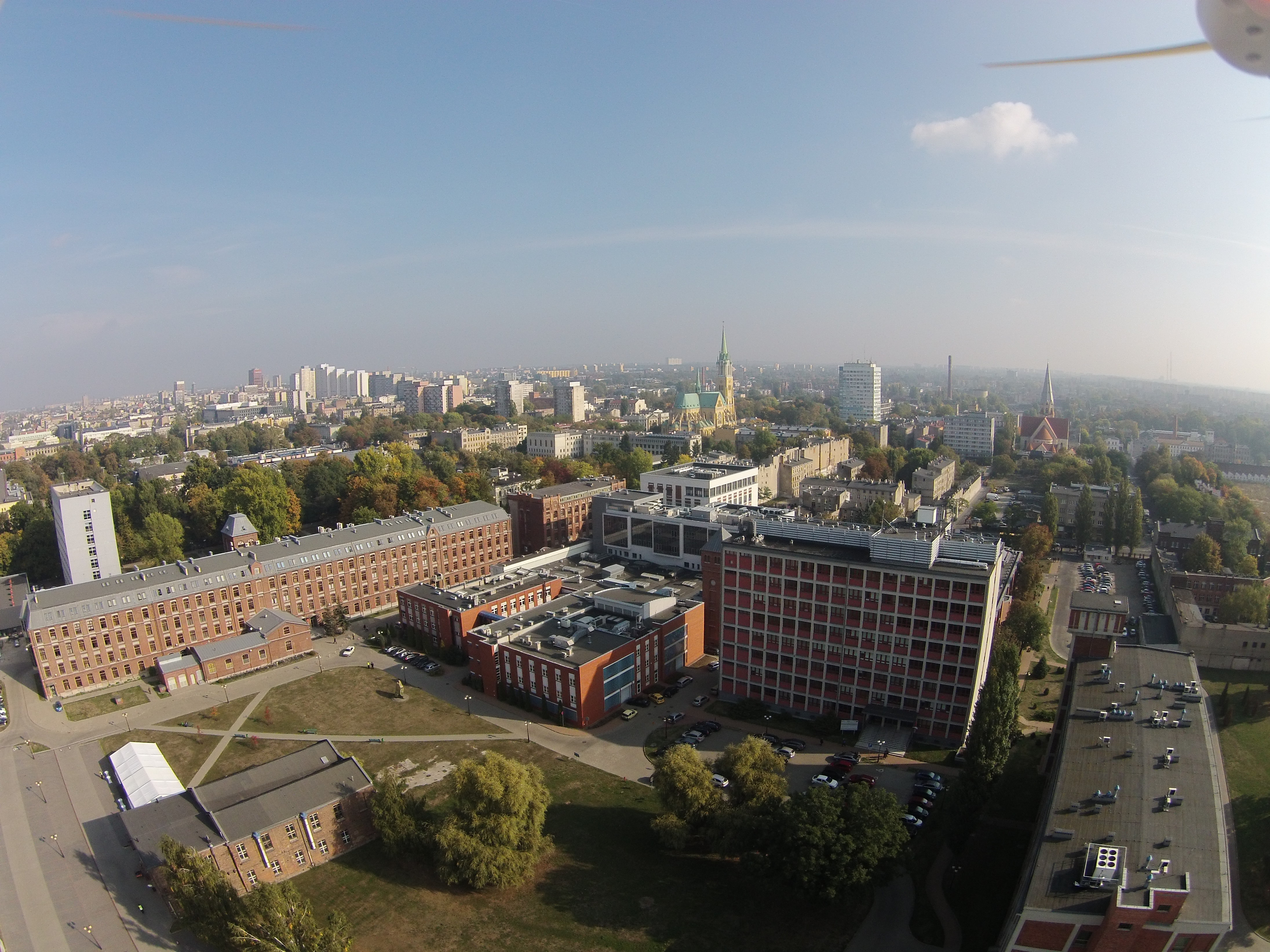 Widok z góry - Politechnika Łódzka, Campus